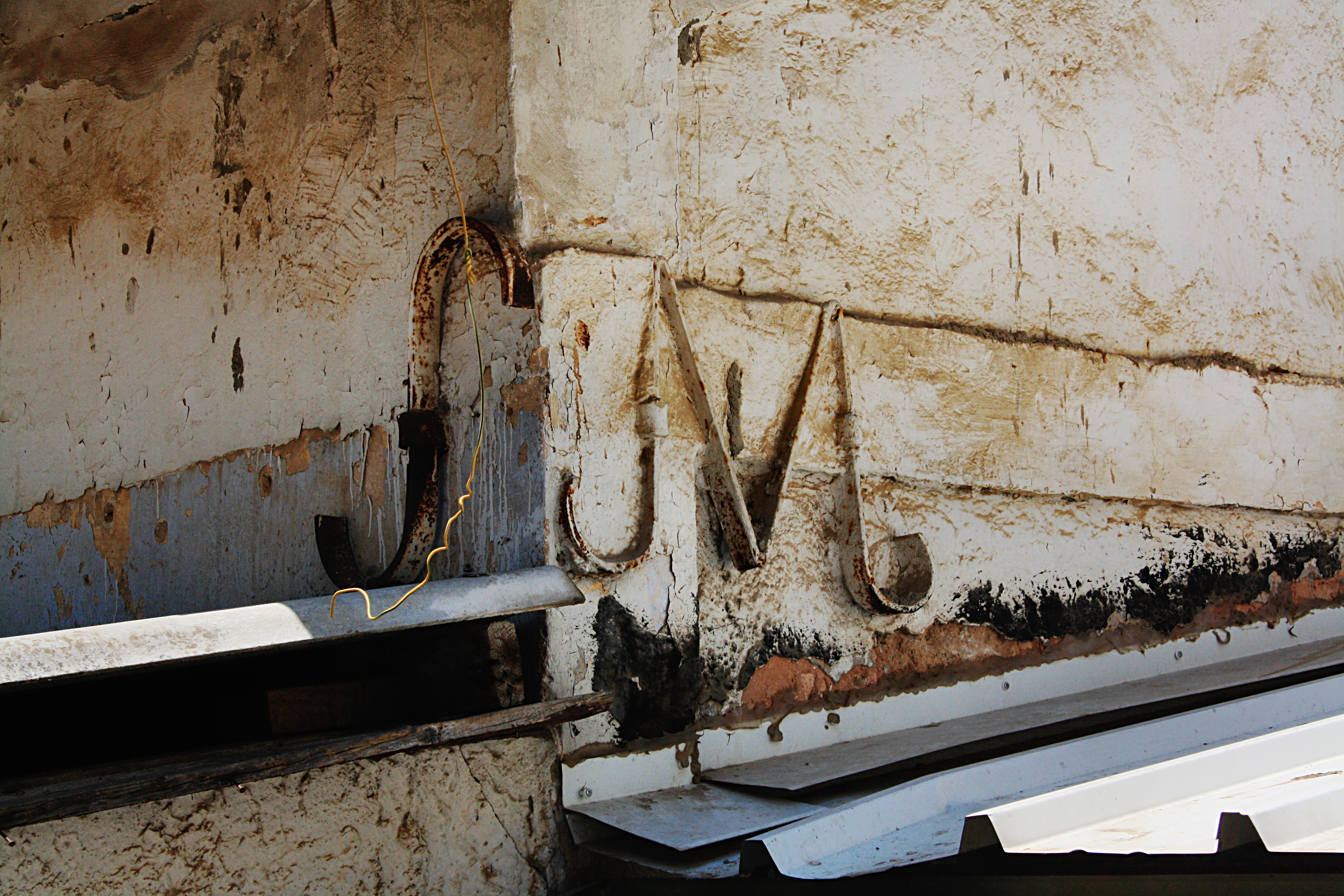 ביתו של מנשה מאירוביץ'.